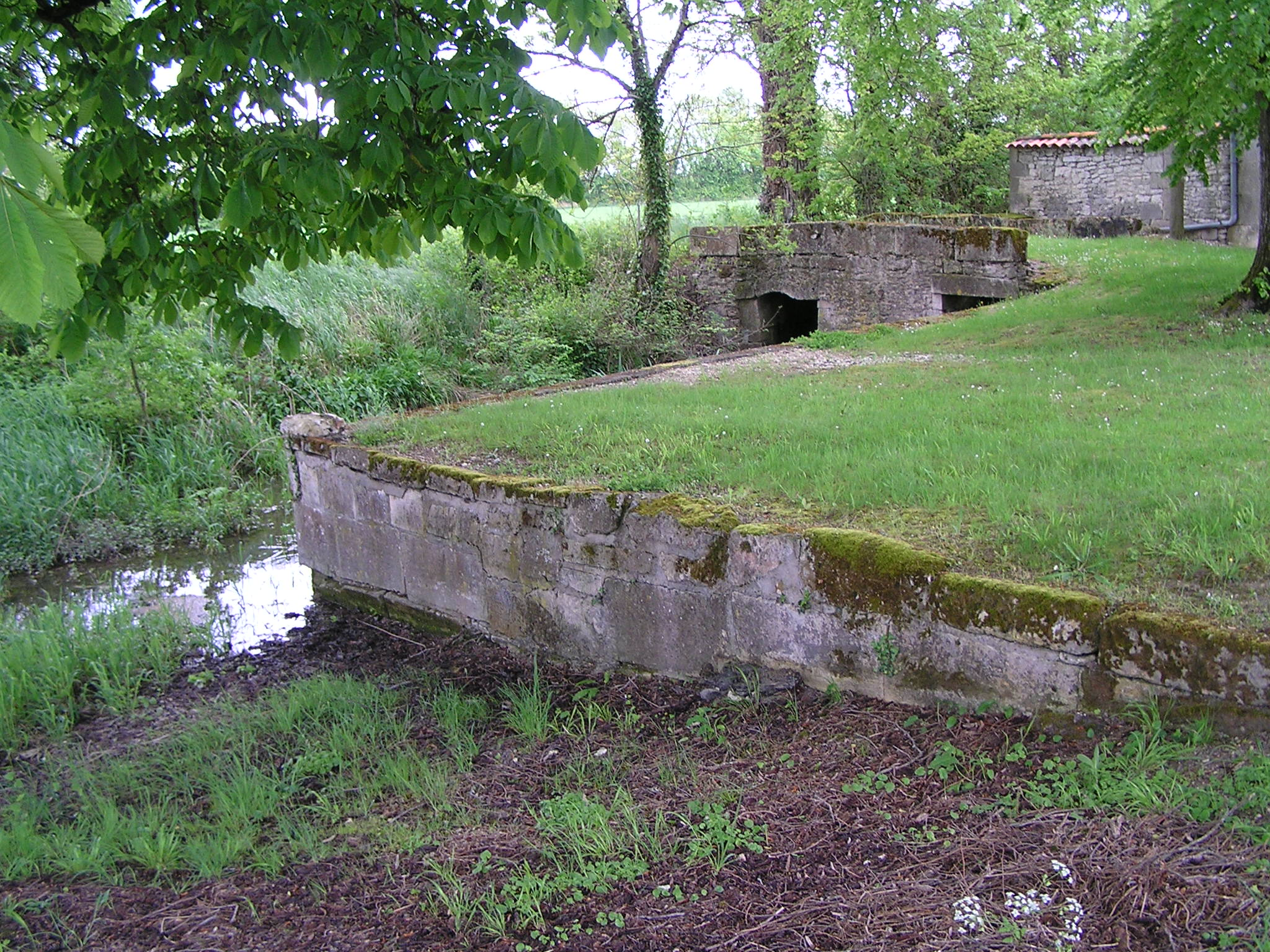 le Chemin Boisné voie romaine Saintes Périgueux au passage du Biau de l'Anglade sur Gimeux